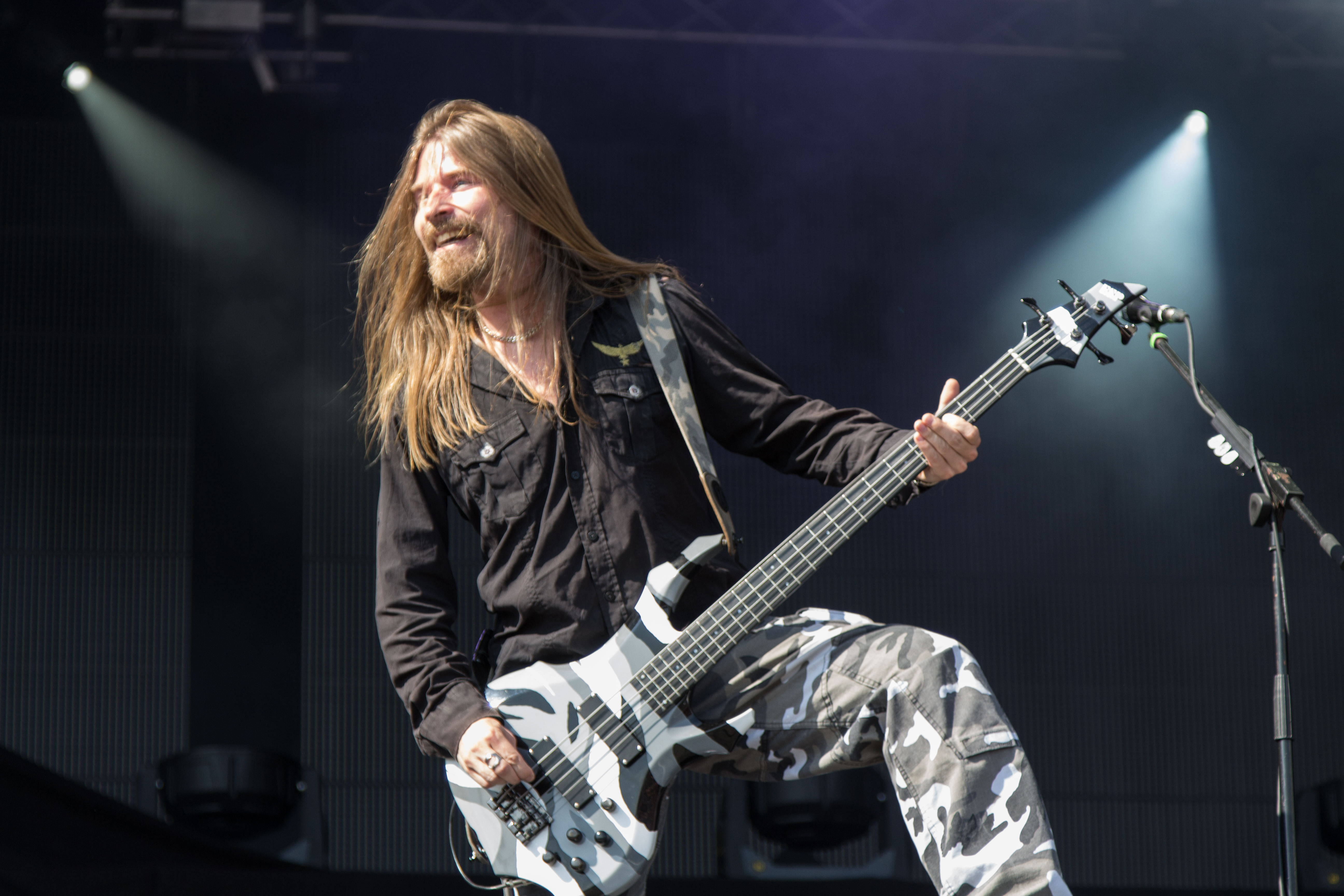 Pär Sundström from Sabaton at the See-Rock Festival 2014